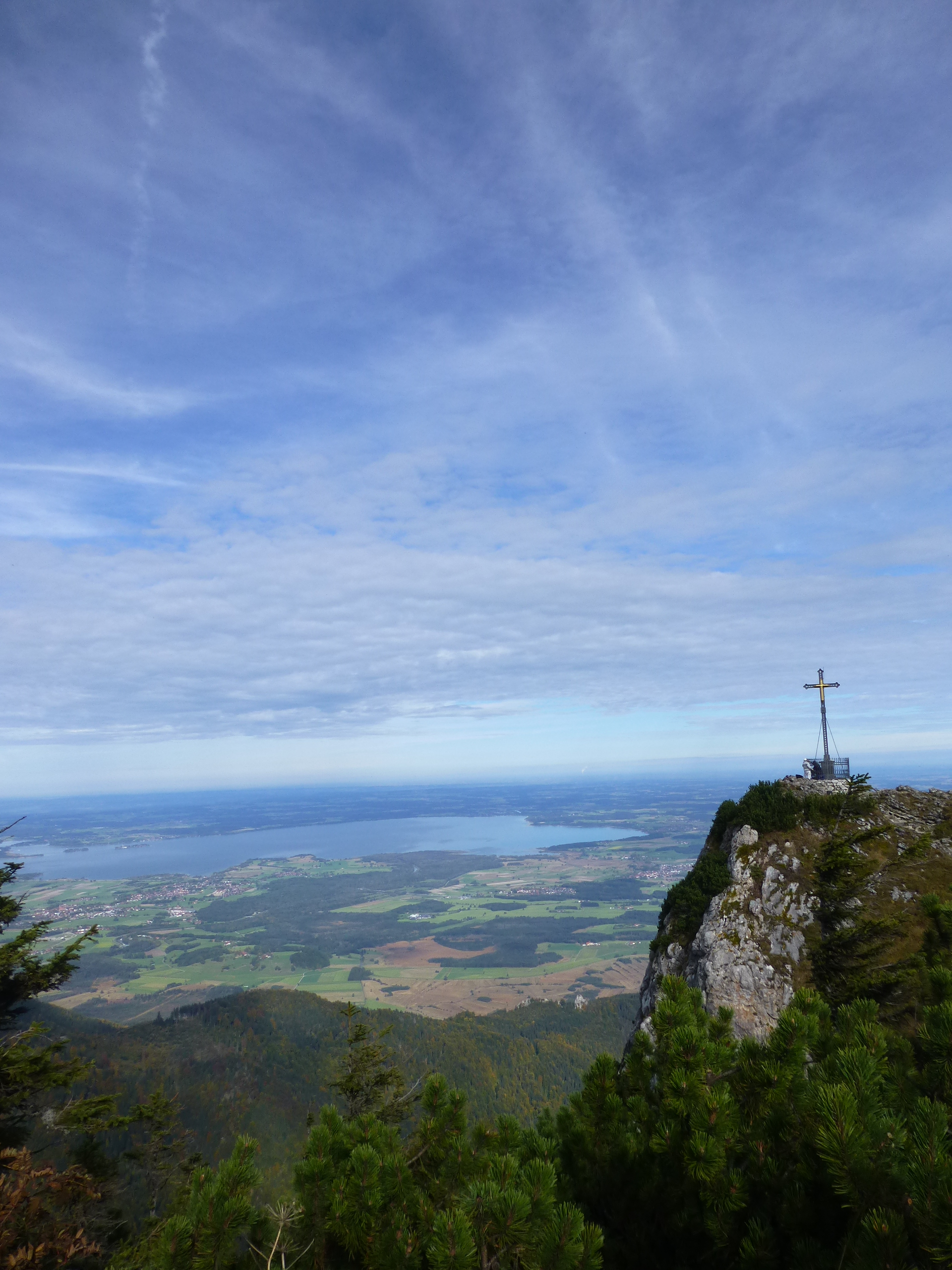 der Hochfelln, umrahmt in den Landesfarben